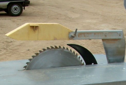 Detail einer Tischkreissäge mit Spaltkeil (schwarz, hinter dem Sägeblatt)